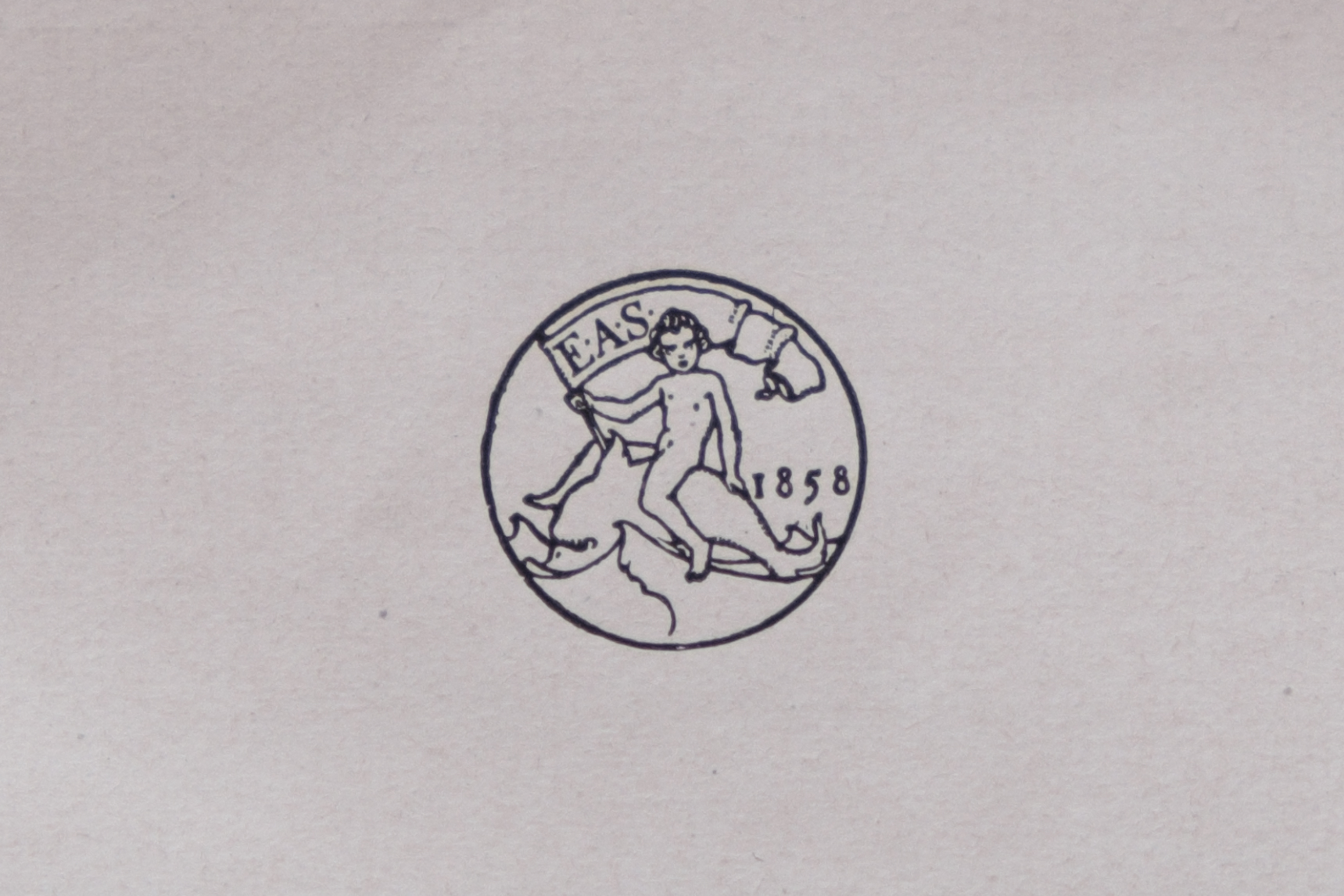 Logo des Verlages E. A. Seemann in Leipzig im Jahr 1927